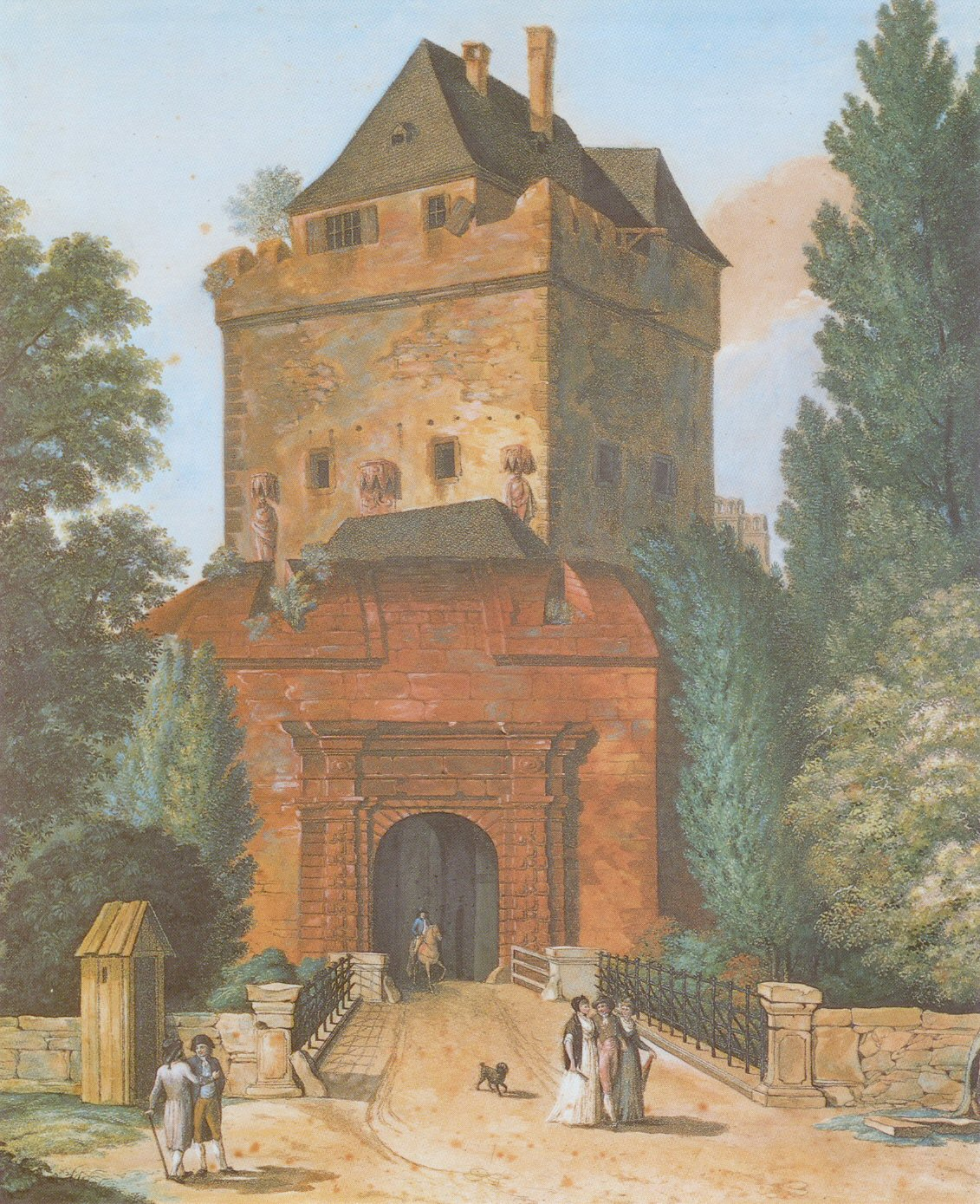 Das Gallustor, erbaut um 1362, niedergelegt 1809.